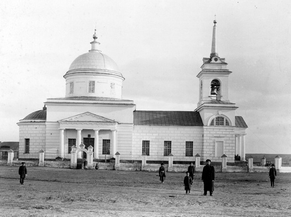 Область Войска Донского, Хопёрский округ, станица Котовская, церковь Рождества Богородицы.